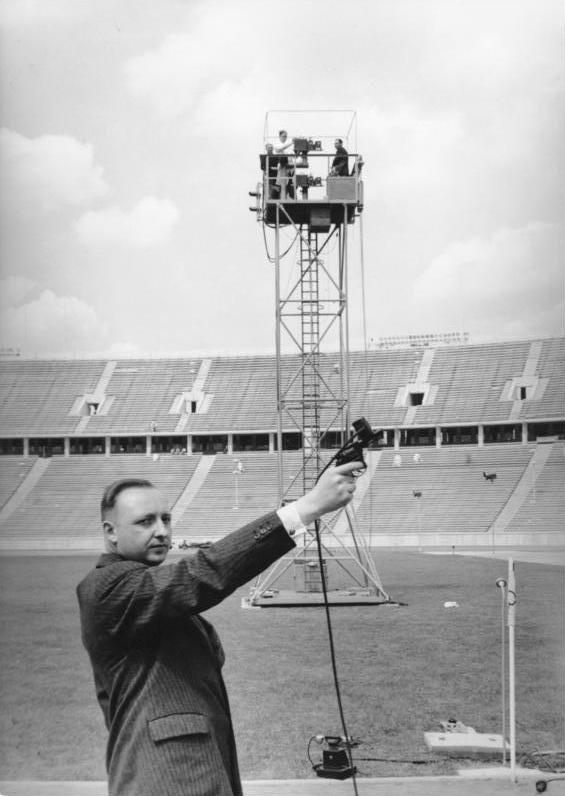 Berlin, 1936 Startkanone und Turm für Zielrichterkamera im Olympia-Stadion